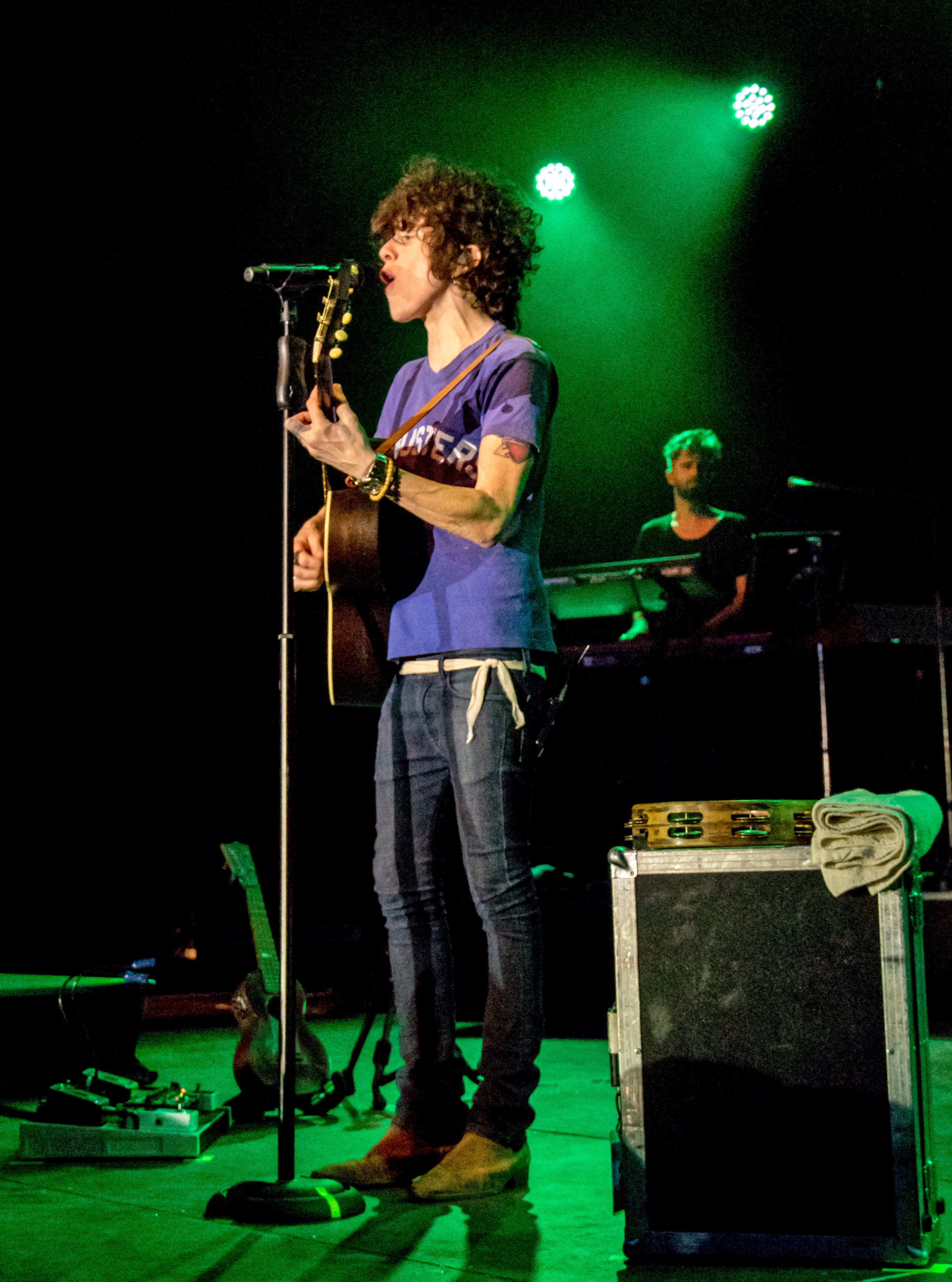 Bilder vom Zelt Musik Festival 2018 in Freiburg im Breisgau LP am 28.07.2018 im Zirkuszelt